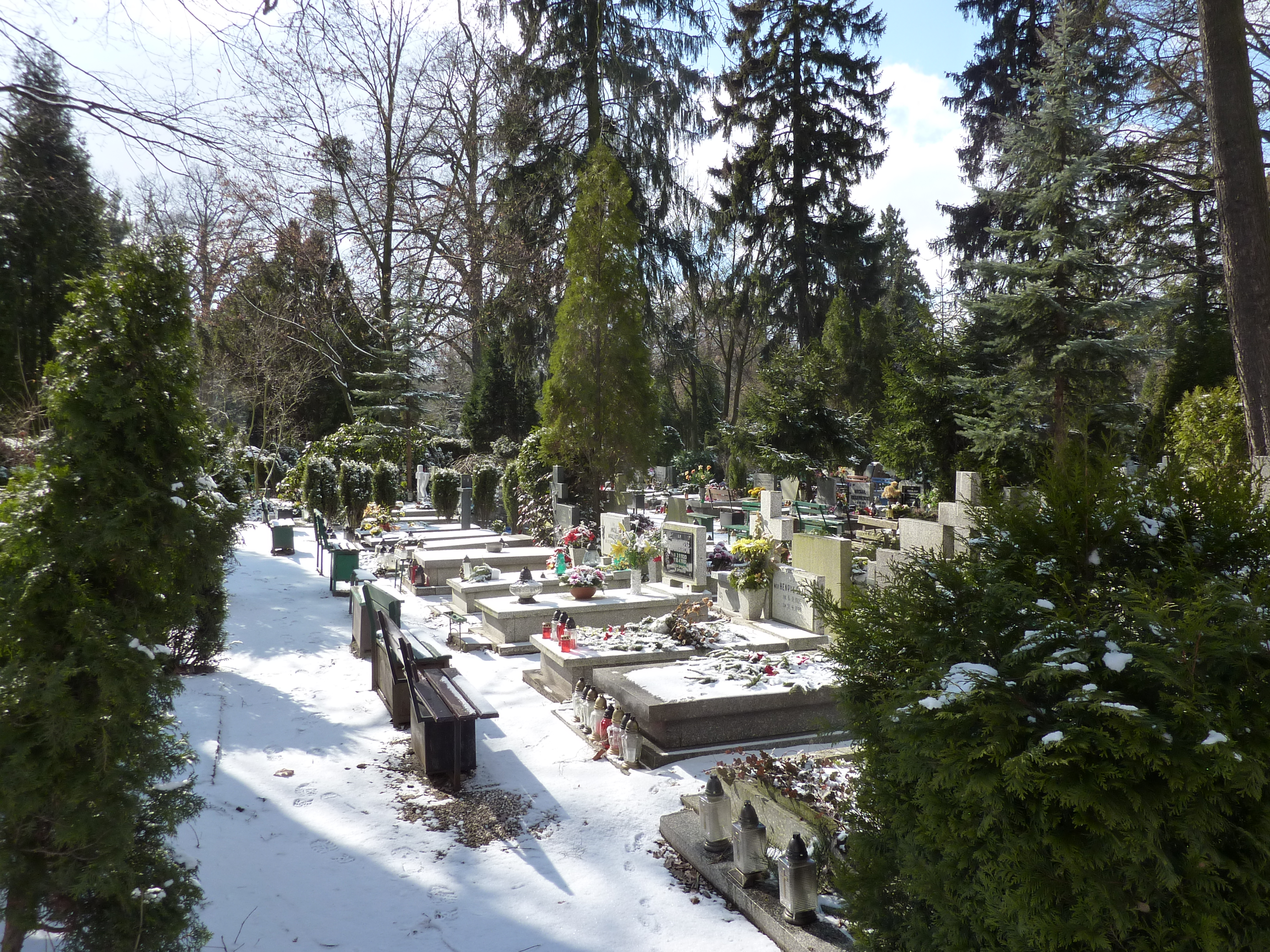 Cmentarz Grabiszyński we Wrocławiu zimą